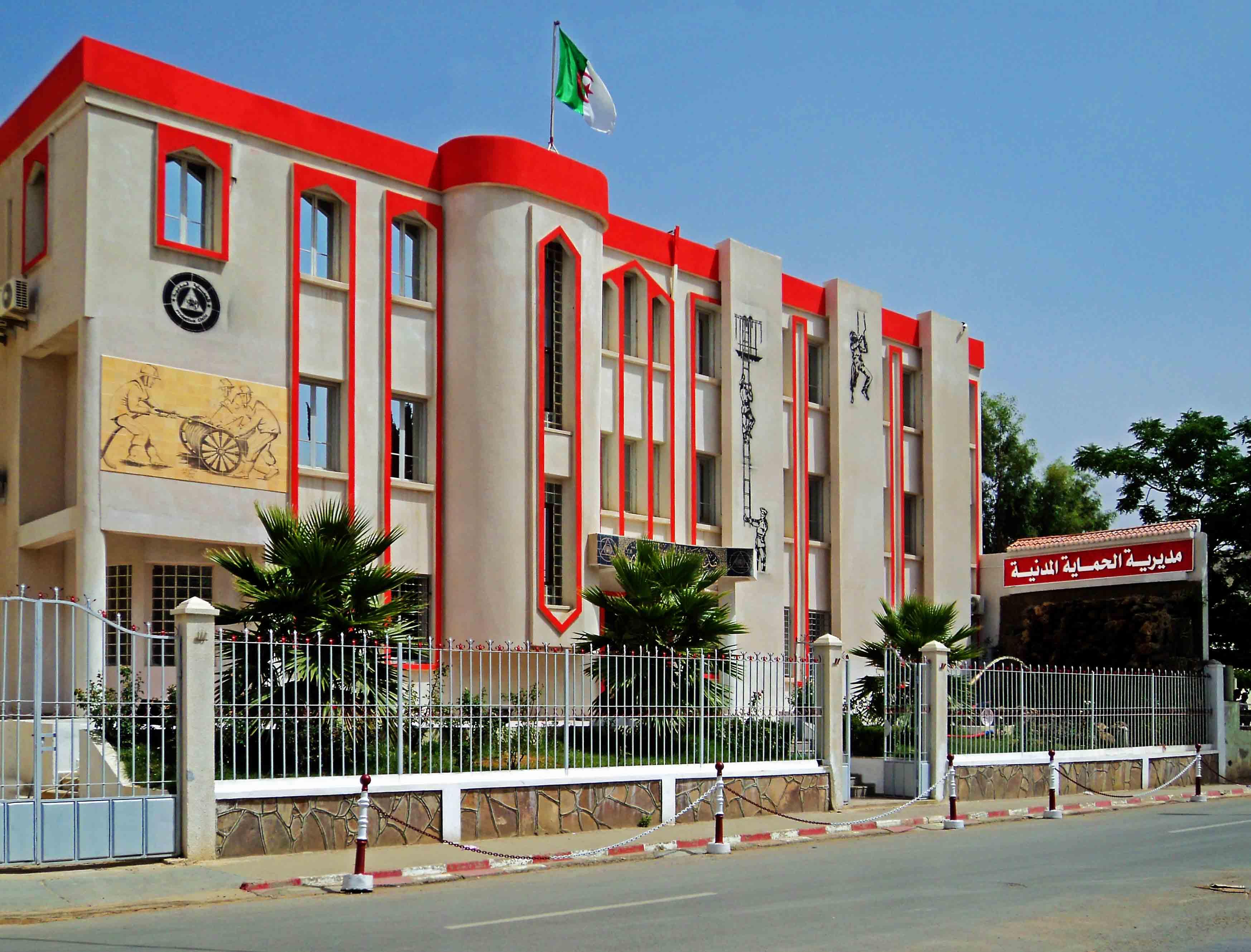 Médéa Protection civile الحماية المدنية